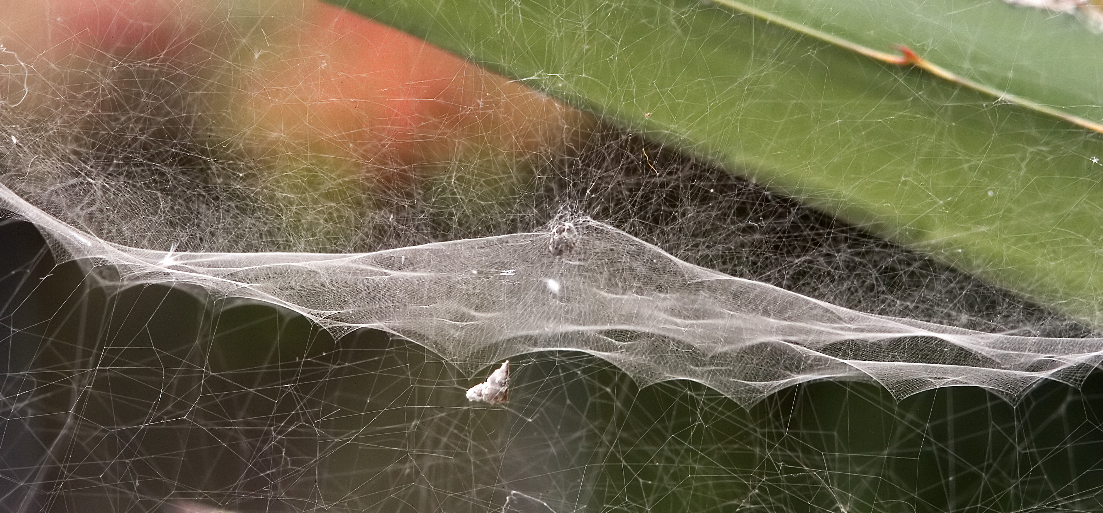 Cyrtophora citricola (Forskäl, 1775)